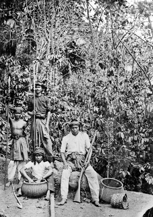 Repronegatief. Teuku Umar met gevolg